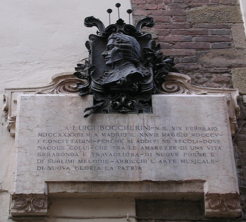 Plaque commémorative de Luigi Boccherini (1905), via Fillungo. Oeuvre de F. Petroni.